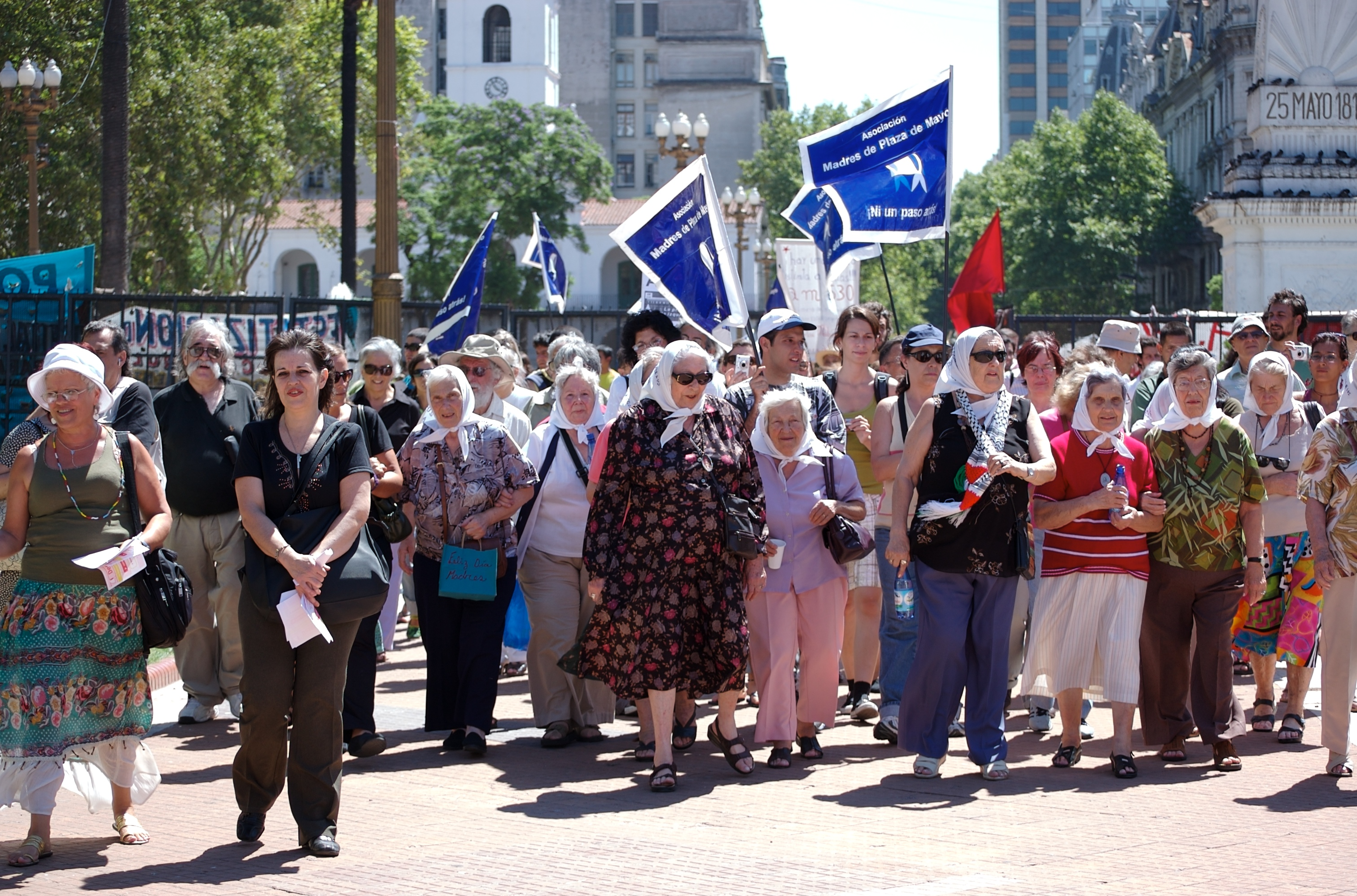 Nais de Praza de Mayo manifestándose como cada xoves ante a Casa Rosada.Rallying to the Casa Rosada